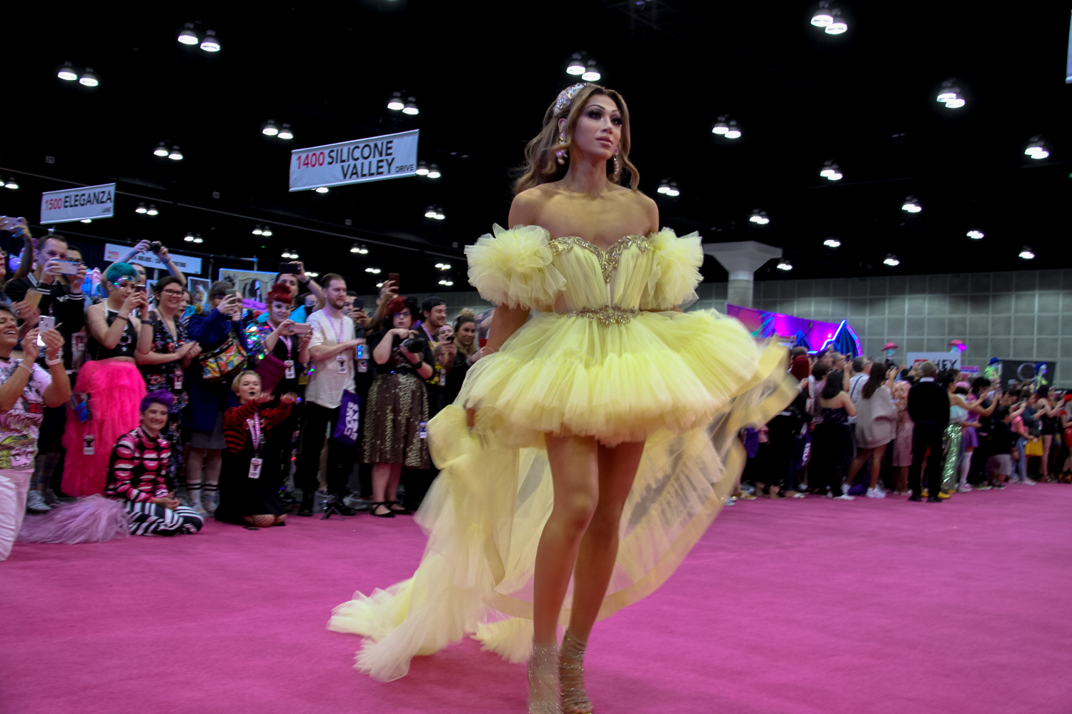 Rupaul DragCon 2019 - Los Angeles